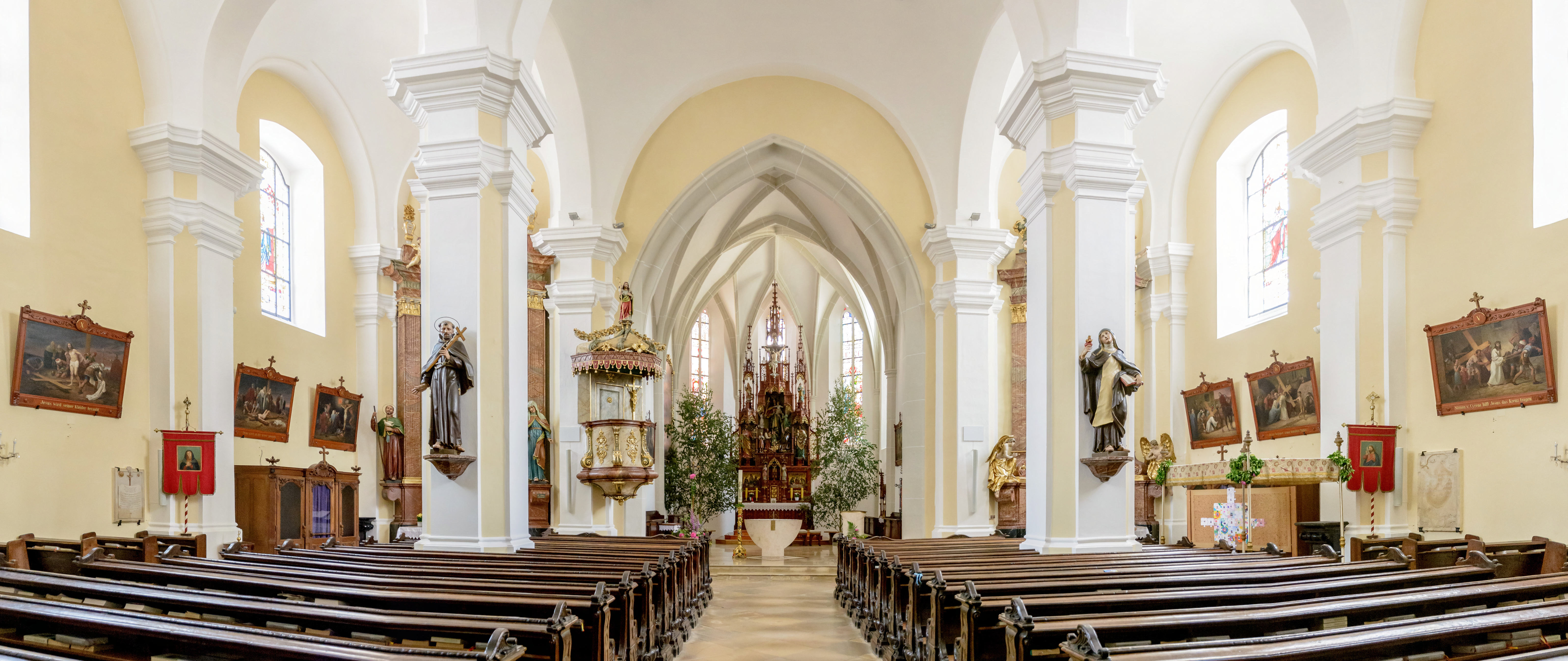 Kath. Pfarrkirche Mariae Himmelfahrt